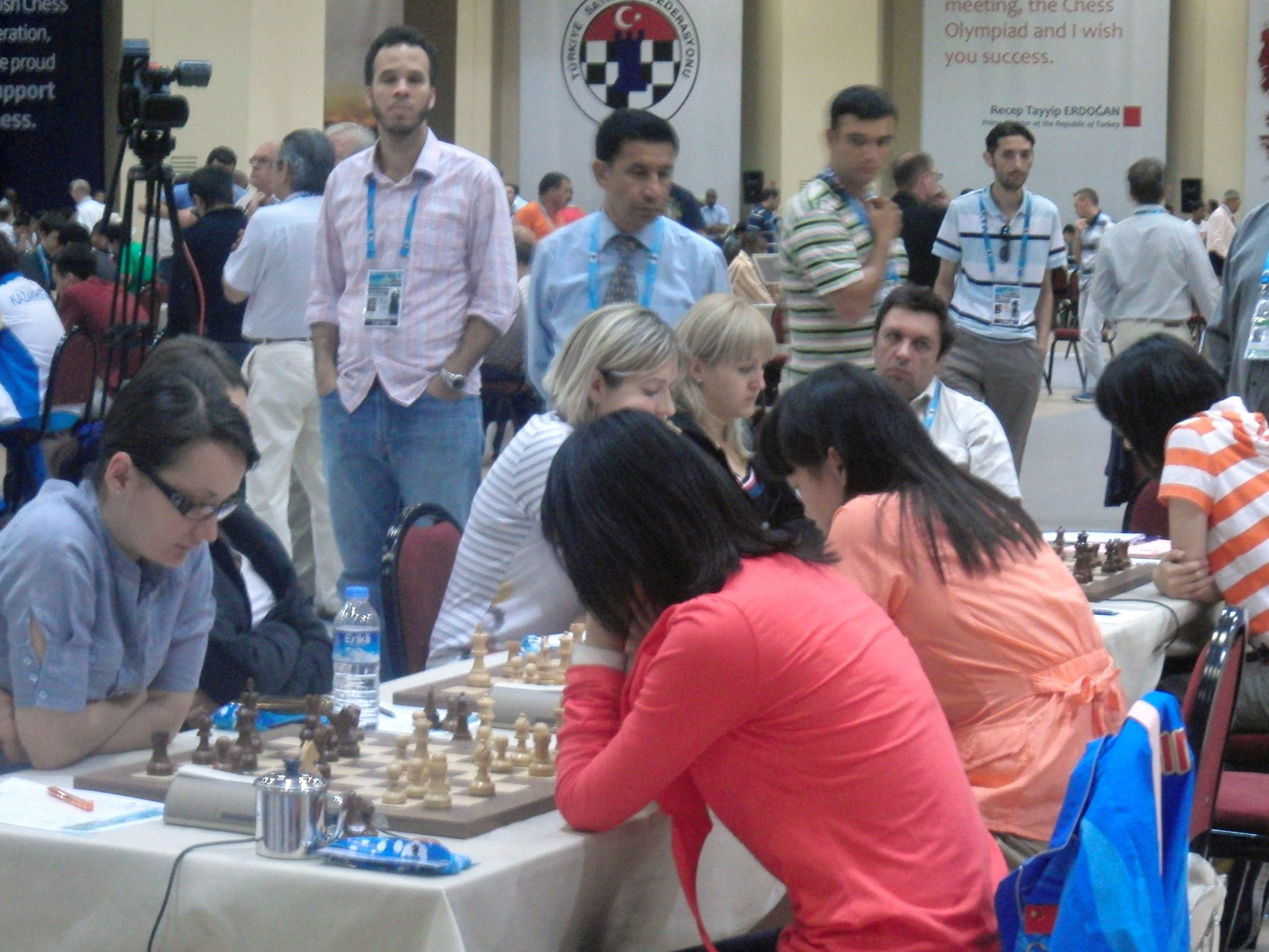 Ukraine (Kateryna Lahno, Maria Muzychuk, Natalia Zhukova, Anna Ushenina) - China, Schacholympiade 2012 in Istanbul (Runde 3).